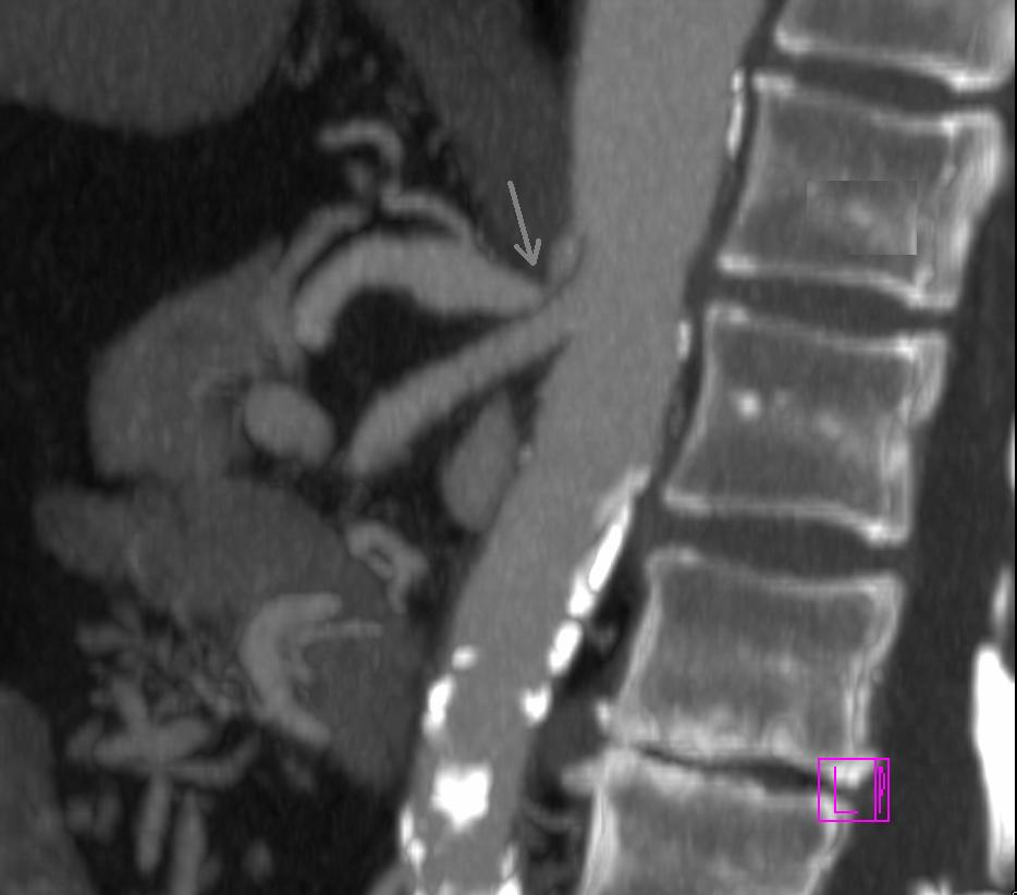 CT-Angiographie (parasagittale CPR) eines Truncus-coeliacus-Kompressionssyndroms